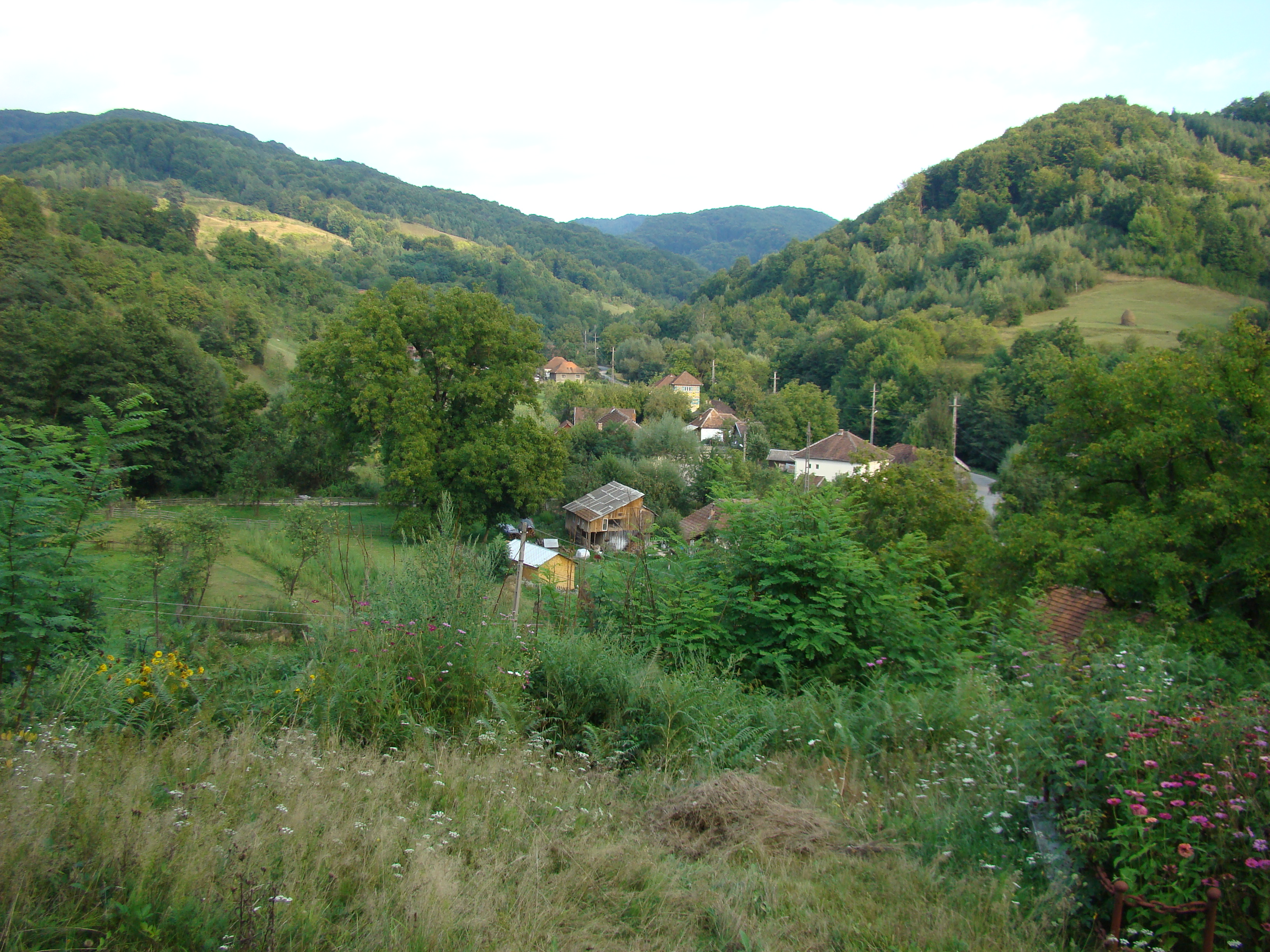 Biserica de lemn din Rovina-Hunedoara